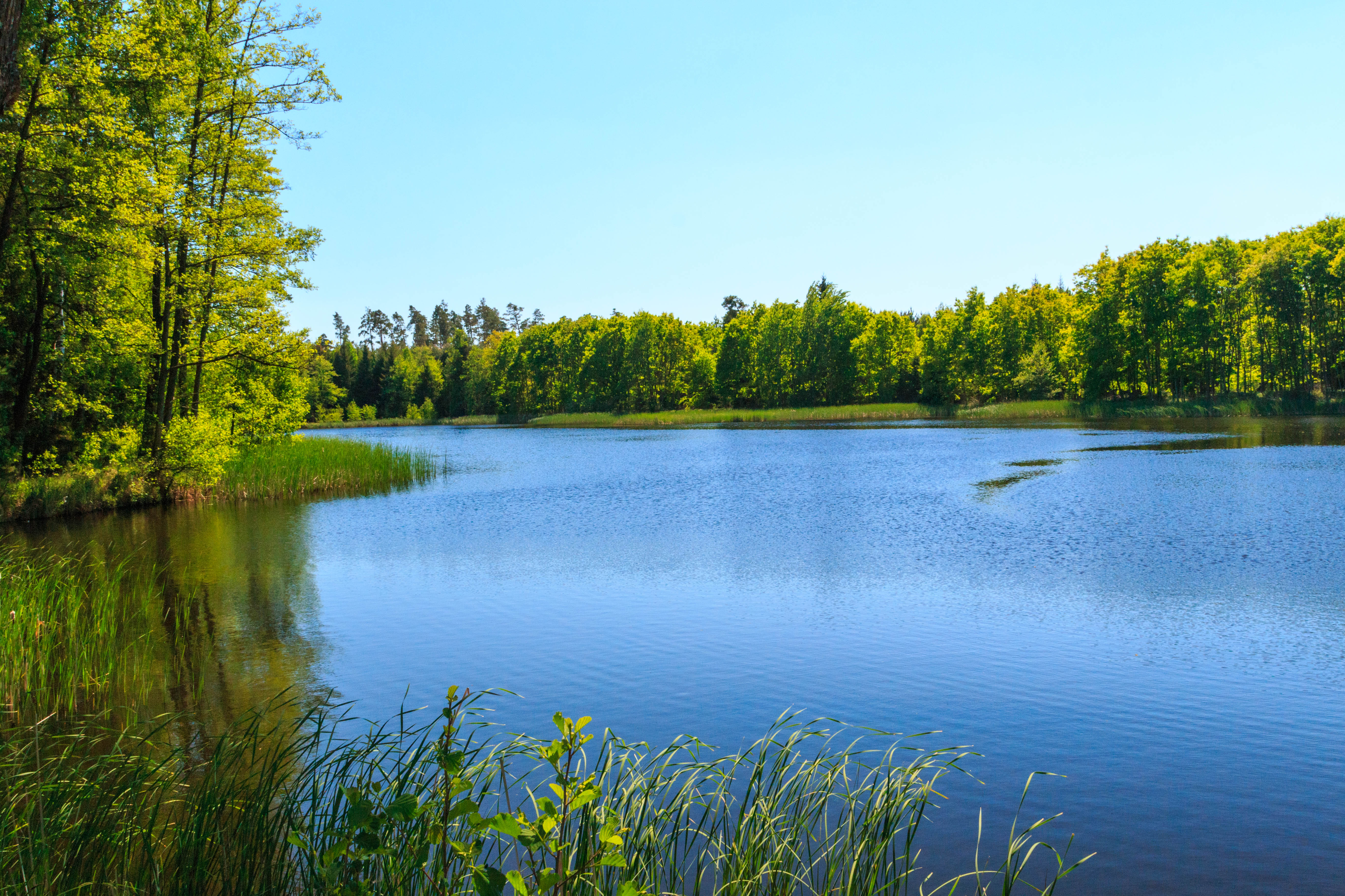 Rybník Výskyt Project: Vodstvo.